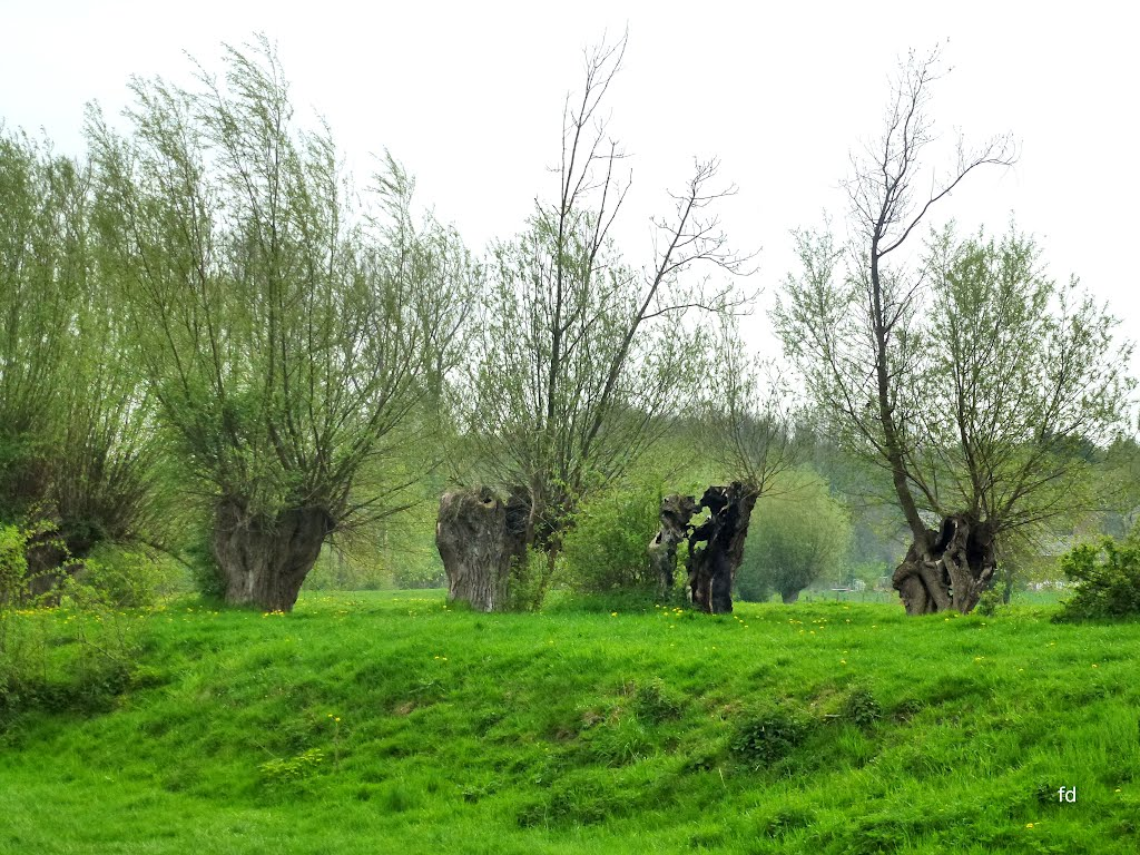 Naturschutzgebiet „Quellgebiet der Gieseler“ (NSG SO-014) in Erwitte mit Kopfweiden.